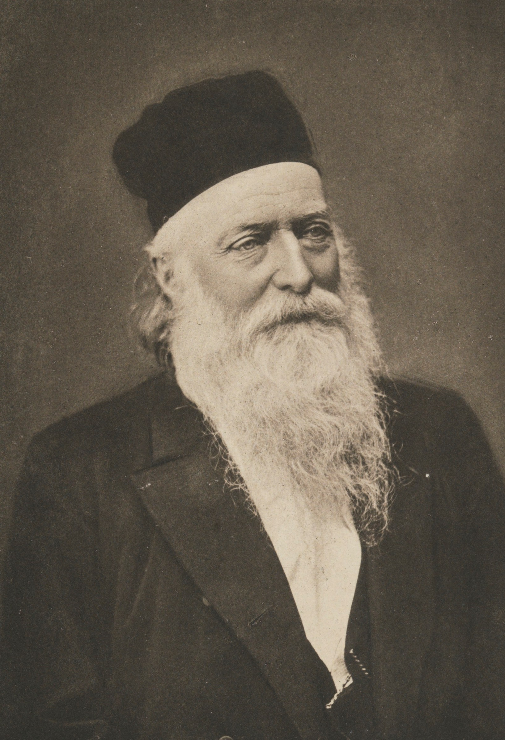 Daniel Cornelius Danielsen. Fotogravyr. Depicted person: Danielsen, Daniel Cornelius (1815-1894) Depicted place